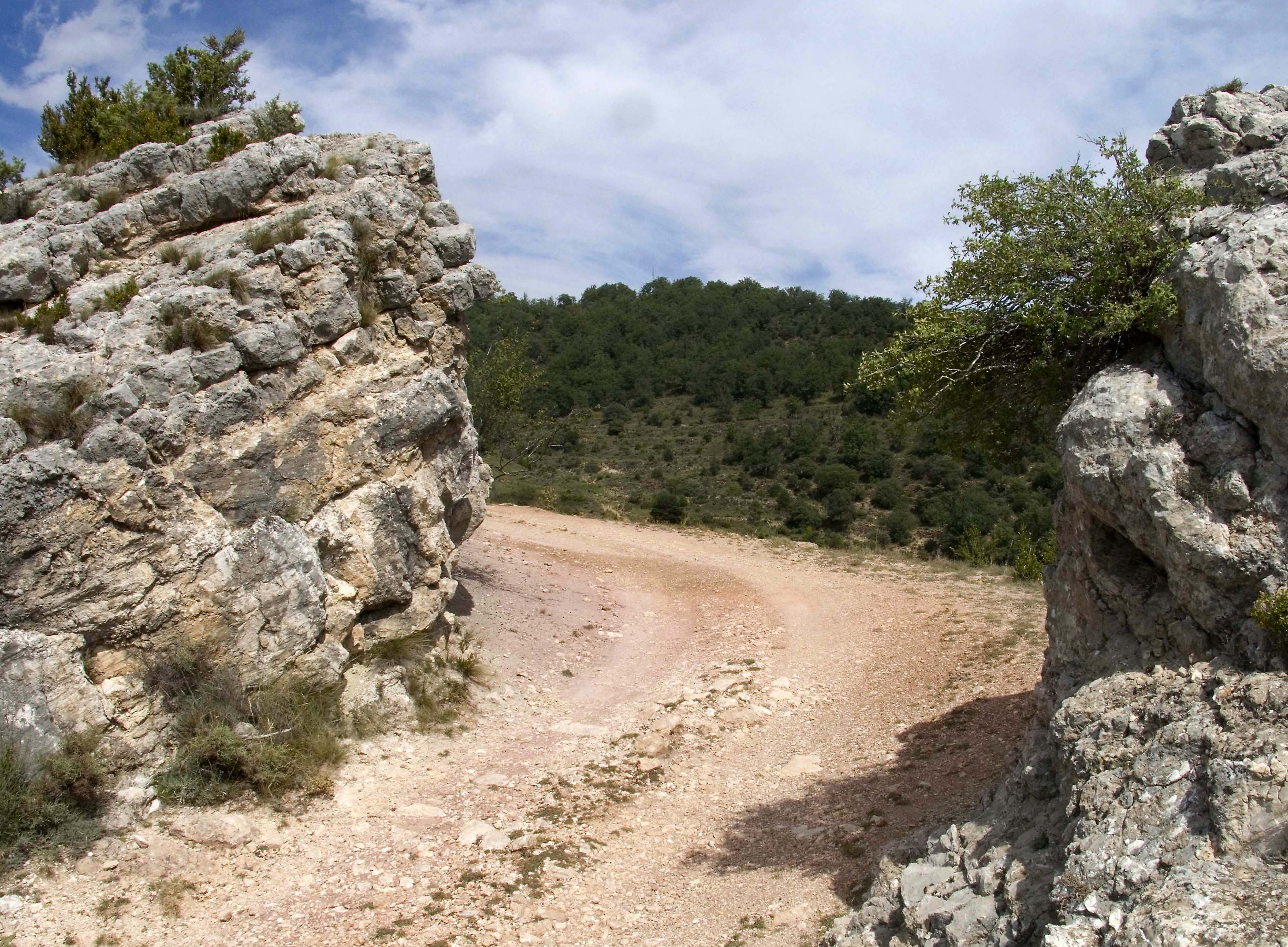 La Portella és el pas natural a Rin i el pas de la transhumància: de sud a nord, des d'Ontinyena i Montsó, cercant les pastures dels ports estivals, abans d'arribar al Turbó, els ramats pugen des de La Pobla de Roda a Rin, i per la Cabanera reial de la Portella (un camí amb més de 32 pams d'amplària) arriben a Vilacarle. El seu destí final són Els banys de Benasc, la Vall d'Estós, etc